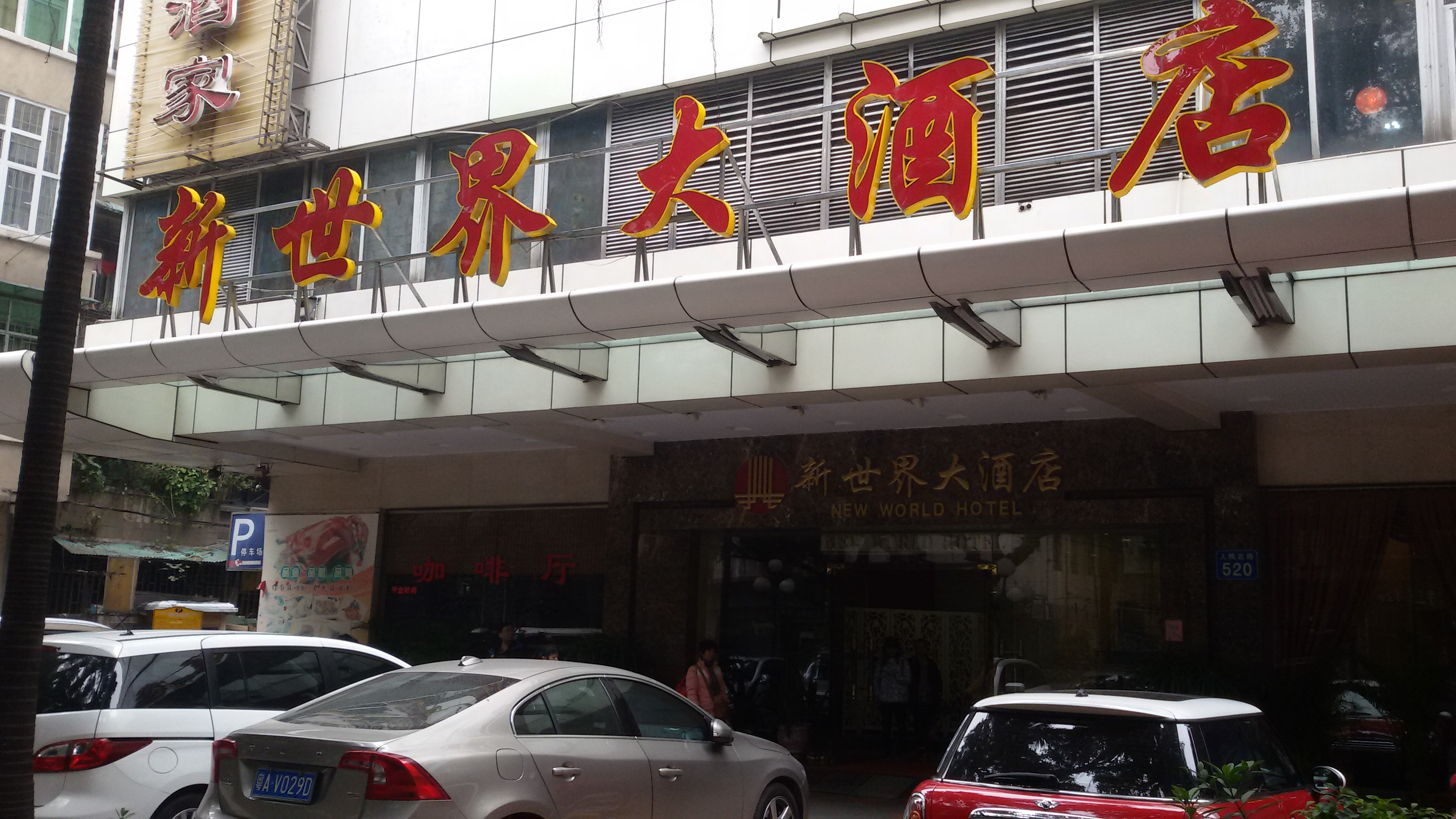 粵語: 廣州嘅新世界大酒店